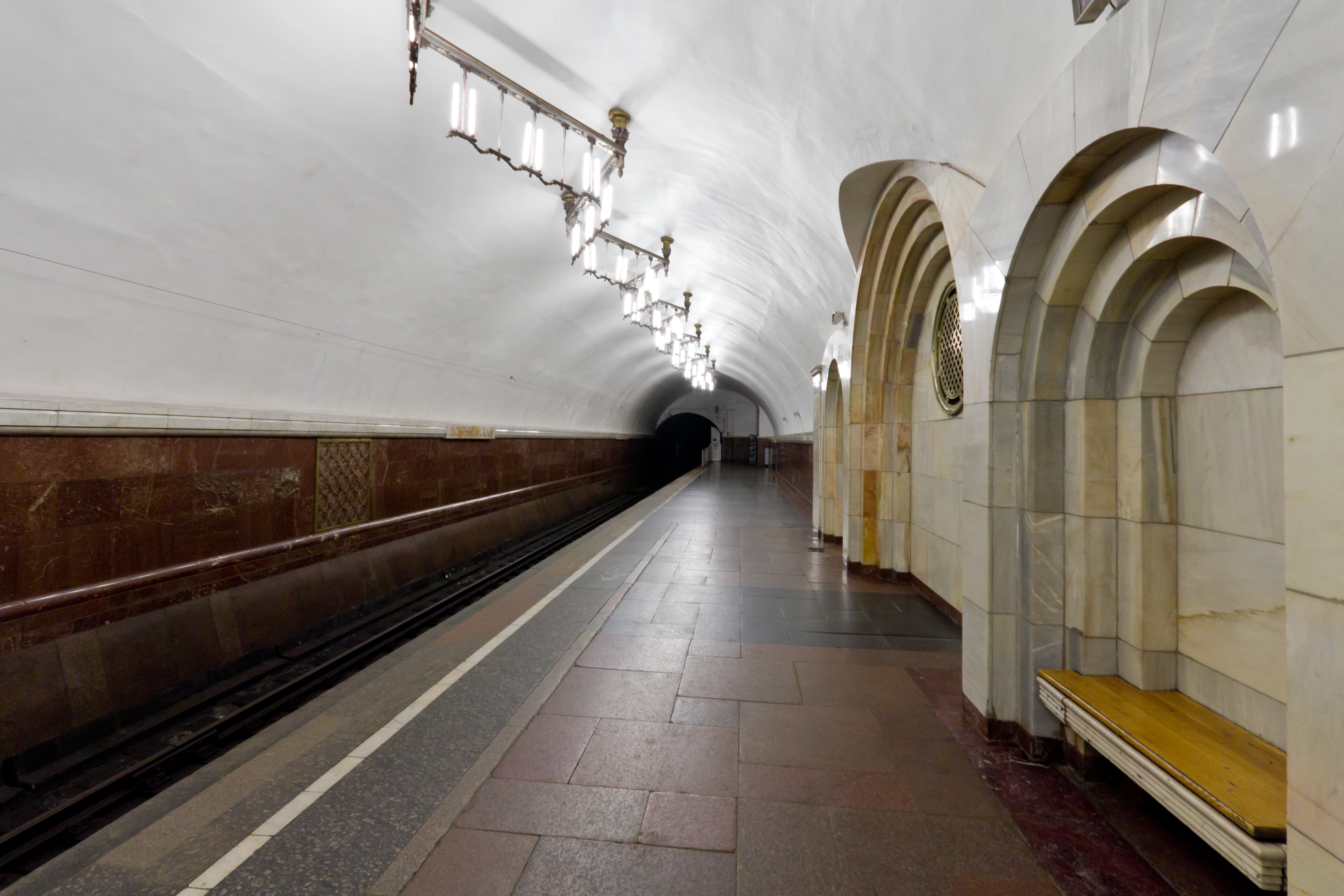 Добрынинская (станция метро)